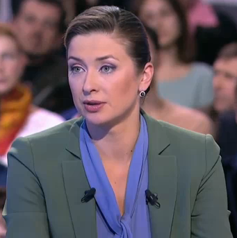 «Прямая линия с Владимиром Путиным». Часть 3